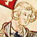 Jan Lucemburský